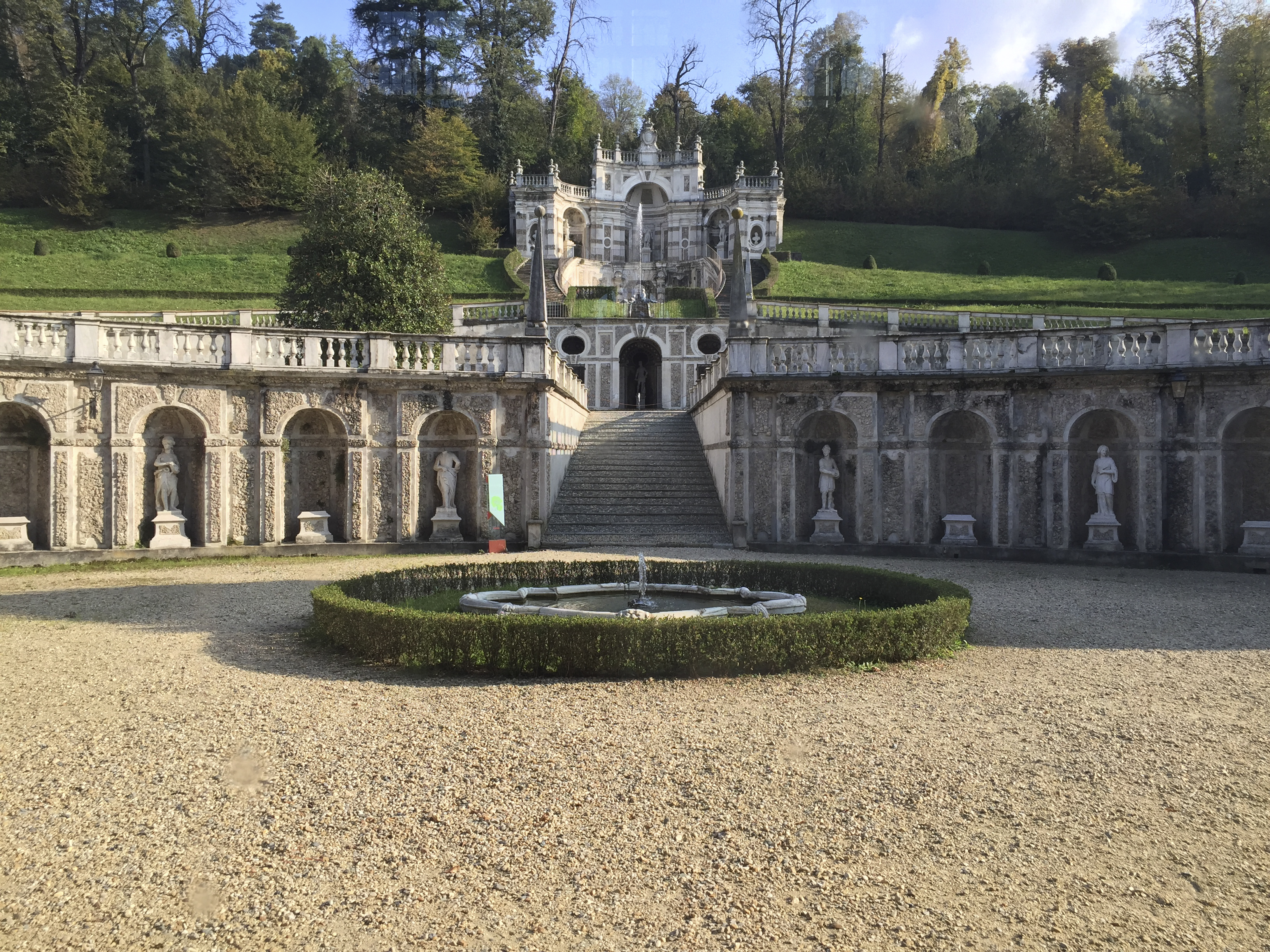 Villa della Regina Torino